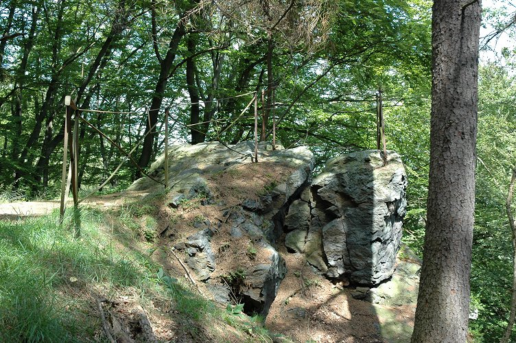 Bäumlersklippe im Harz (Nähe Ilsenburg)